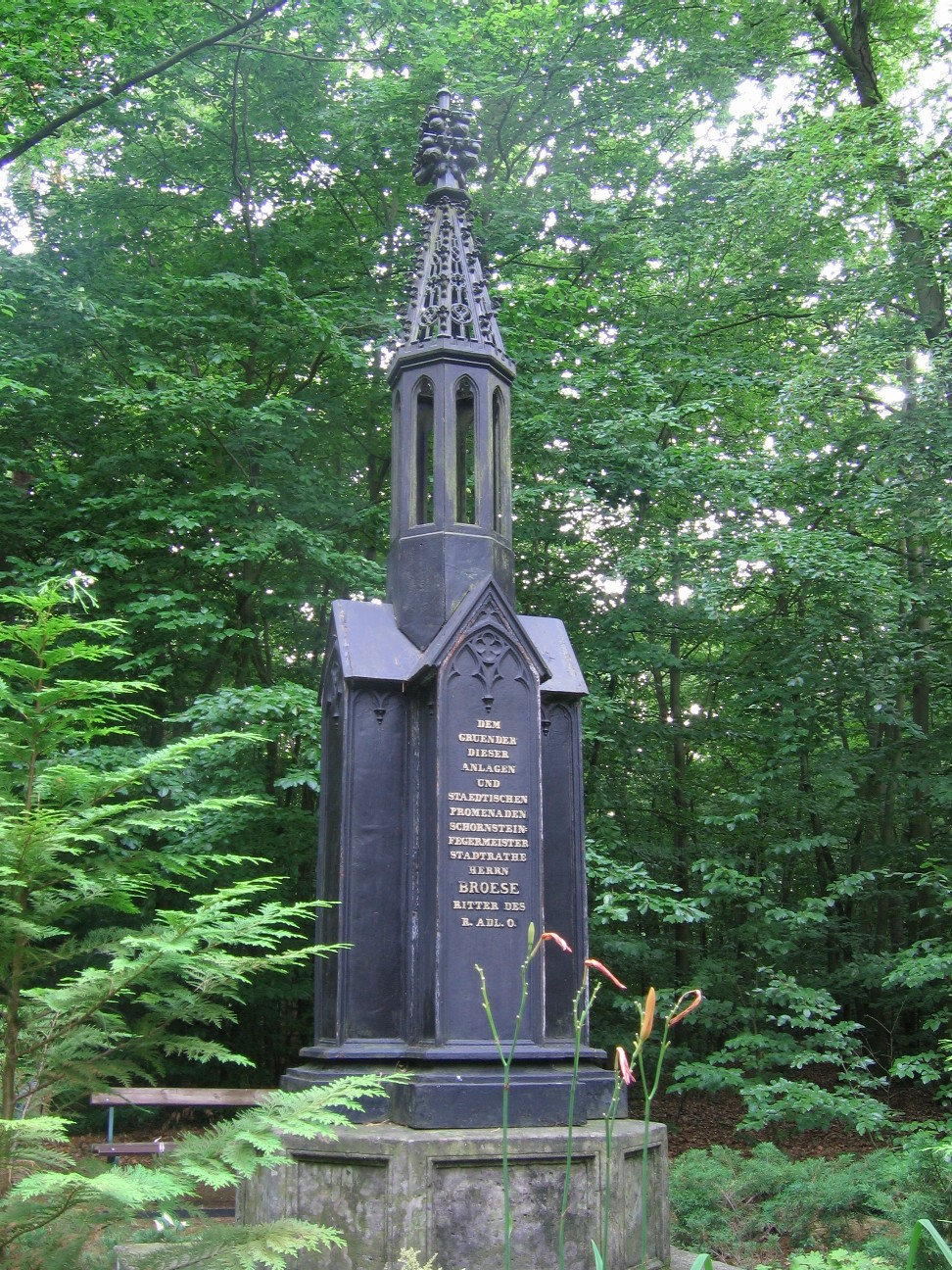 Description=Brösedenkmal im Krugpark in Brandenburg an der Havel Source=own work Date=19. Juli 2006 Author=User:Martinum